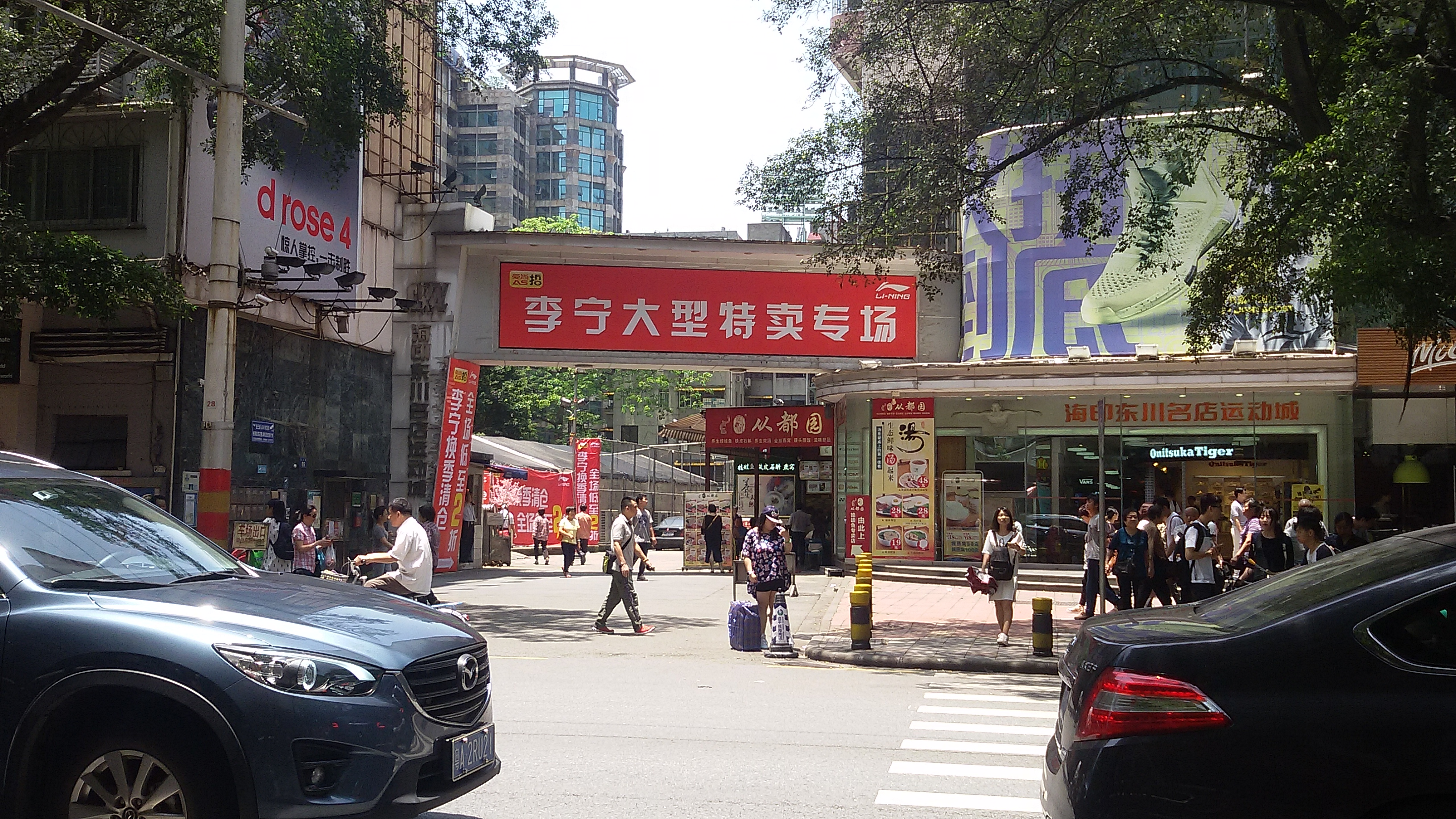 粵語: 陳仲偉出事時當日嘅案發現場附近（原版，喺廣視新聞同新聞日日睇、今日關注、DV現場節目將上邊嘅紅色部分打咗馬賽克）